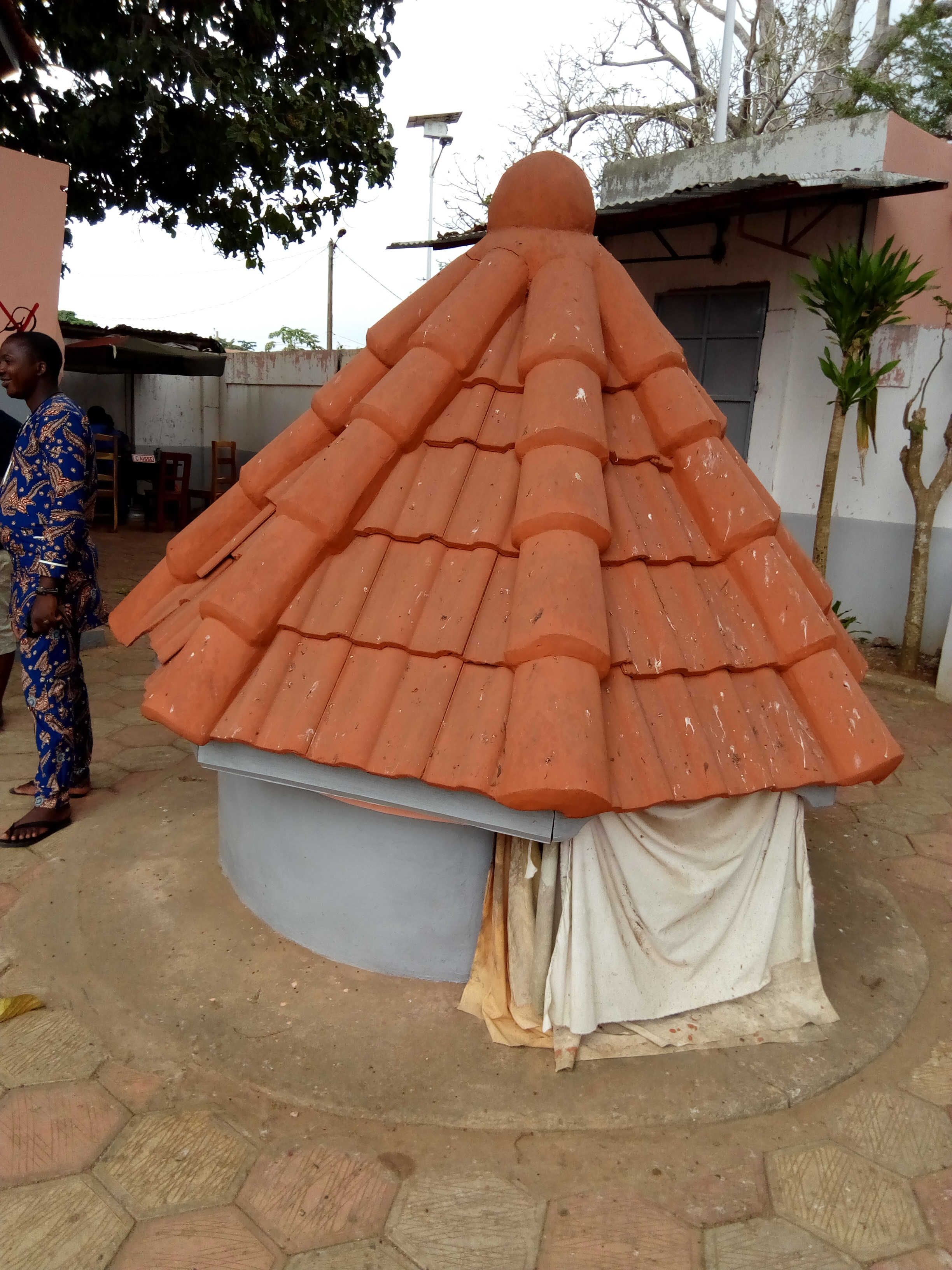 case rituel pour les sacrifices aux pythons et leur divinité au temple des pythons Ouidah